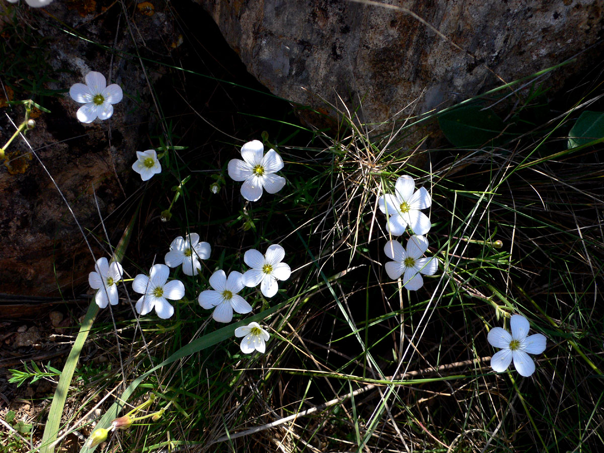 Arenaria montana en el Puntal del Moco (Parque Natural de la Sierra de la Muela) en Cartagena (Spain)